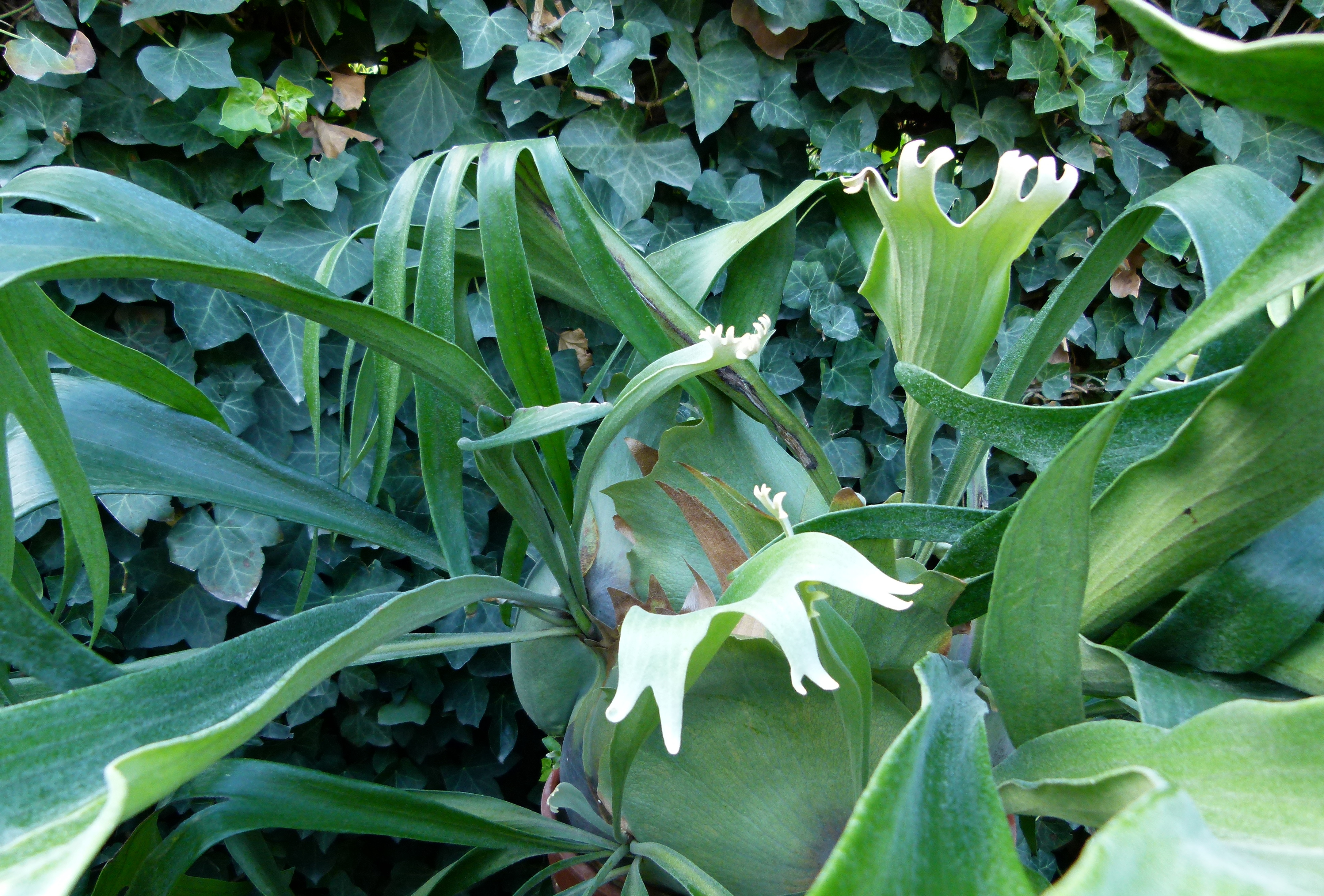 Serres du Jardin du Luxembourg